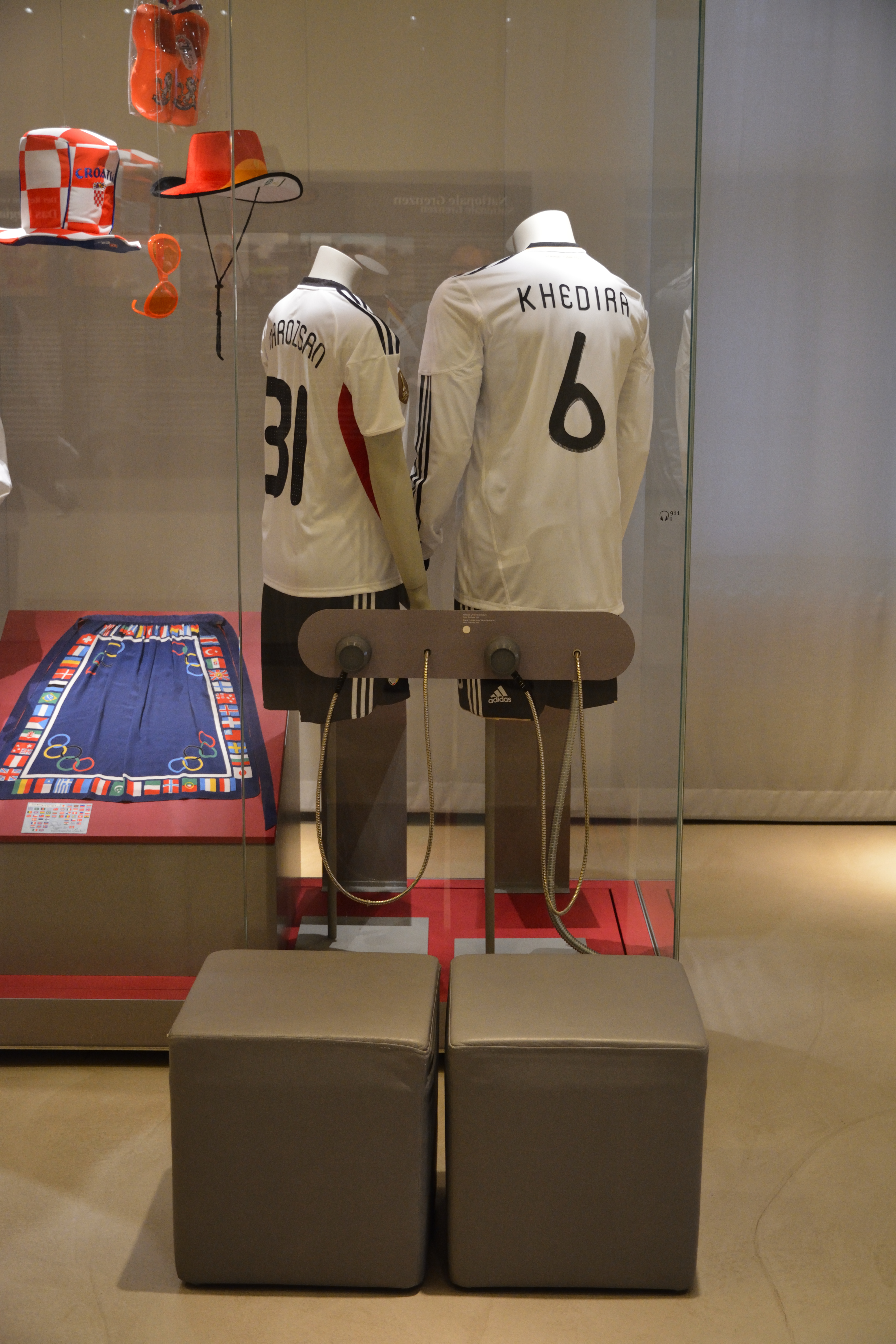 Exponate im Museum Europäischer Kulturen (Geschenk des Deutschen Fußballbundes von 2010): Frauenfußballtrikot der deutschen Frauennationalmannschaft von Dzsenifer Marozsán [1] Männerfußballtrikot der deutschen Nationalmannschaft von Sami Khedira [2]